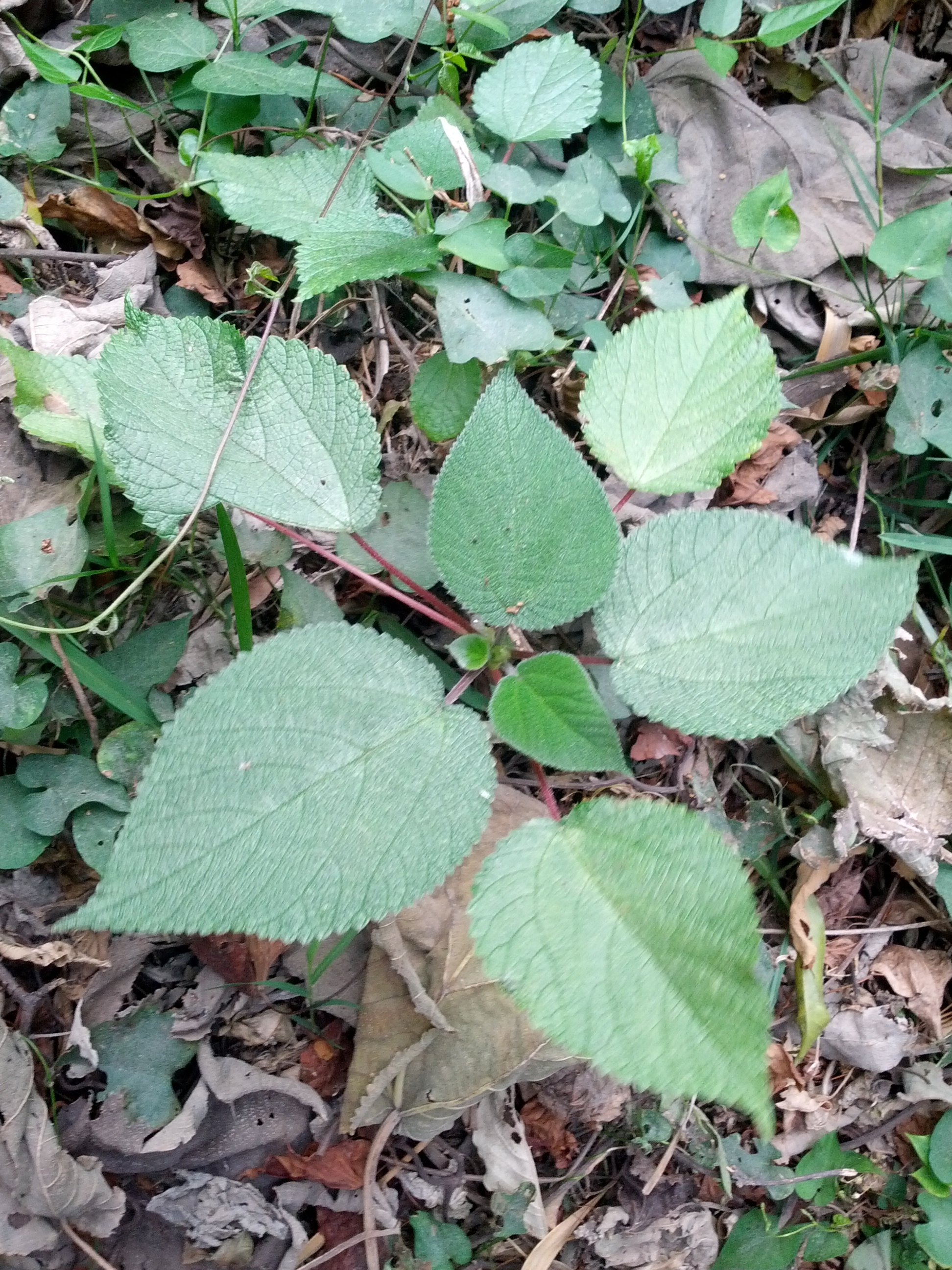 Chichicaste, tomada en Ciudad de Guatemala